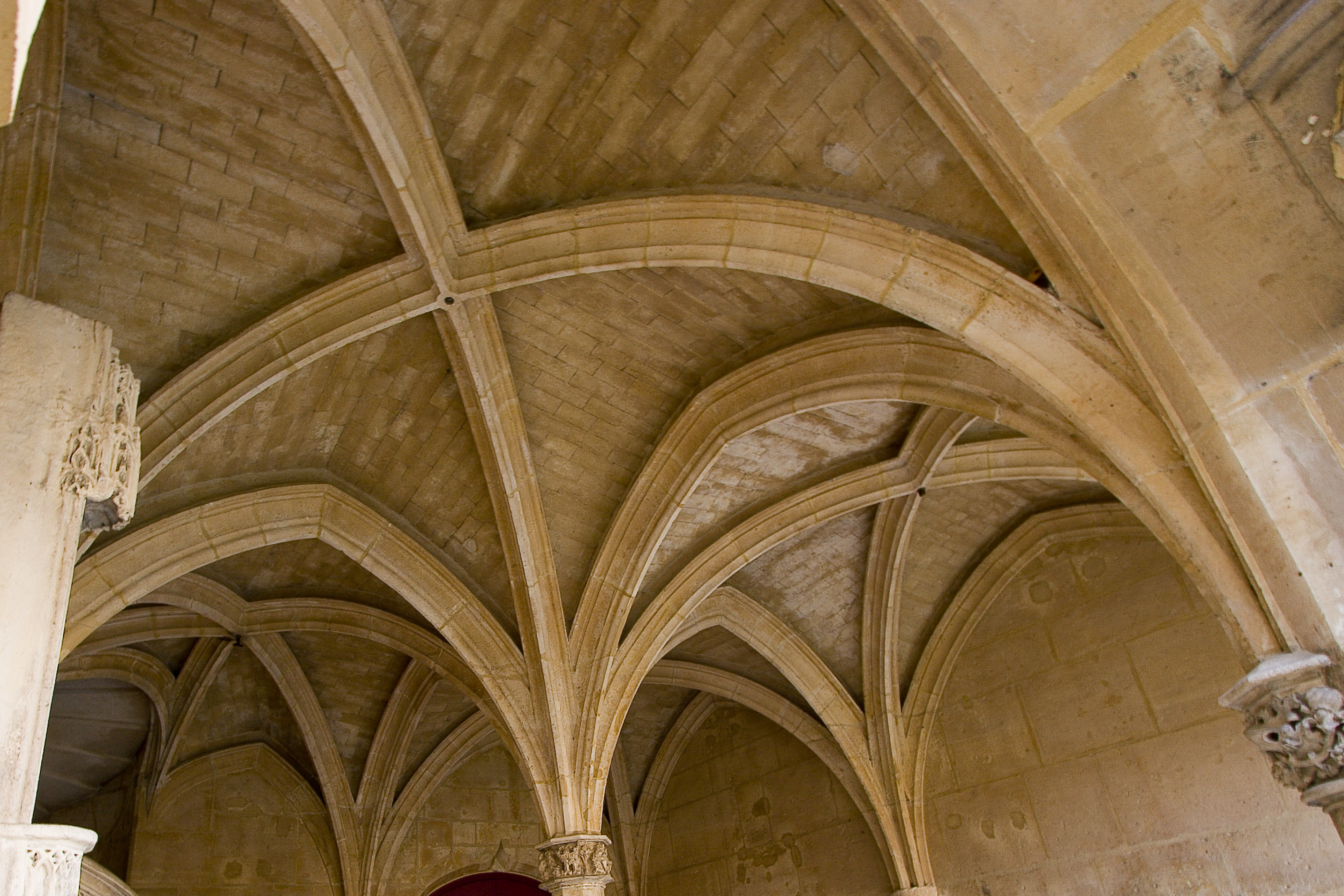 Arcades de l'Hôtel de Cluny à Paris. Préau du jardin. Auteur Lefebvre Didier